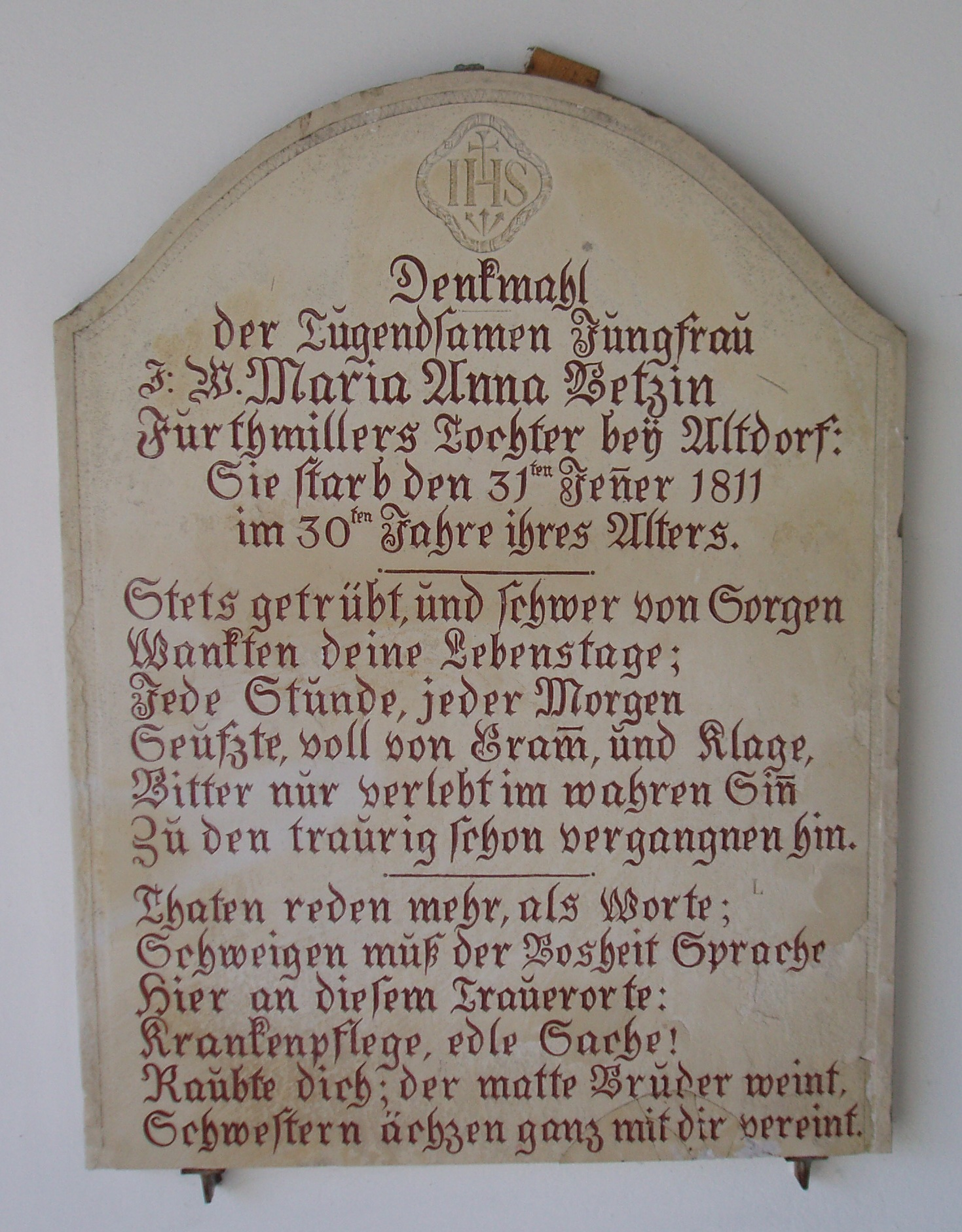 Kirche von Altdorf, Anlautertal, Landkreis Eichstätt, Grabstein der Anna Maria Betz